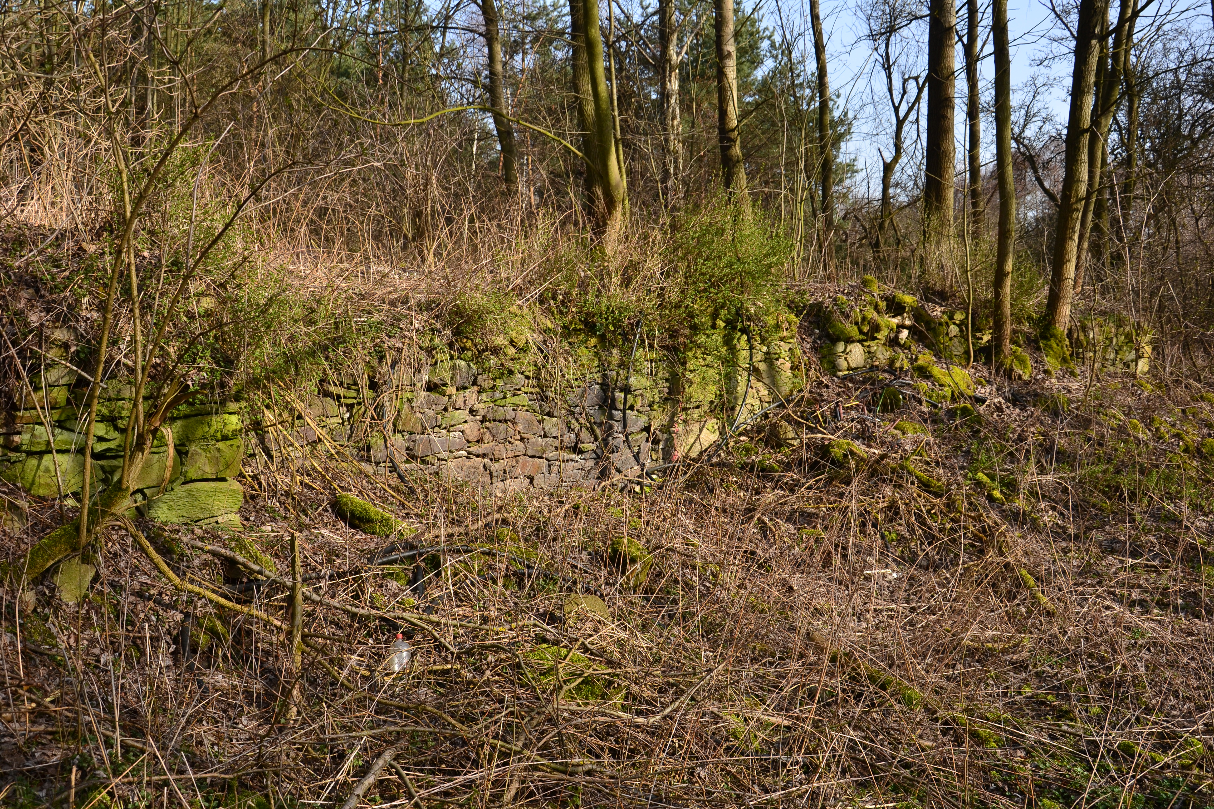 Fragmenty zdiva domů